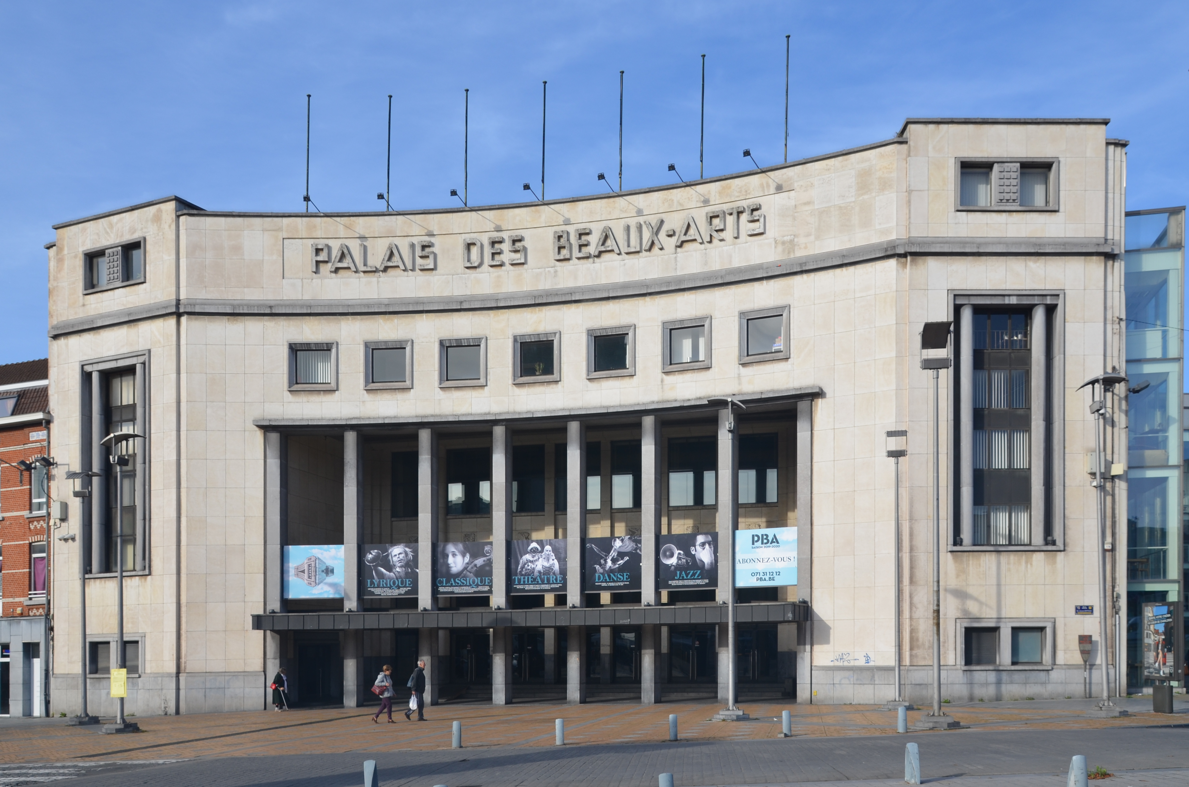 Palais des beaux-arts de Charleroi - façade principale.